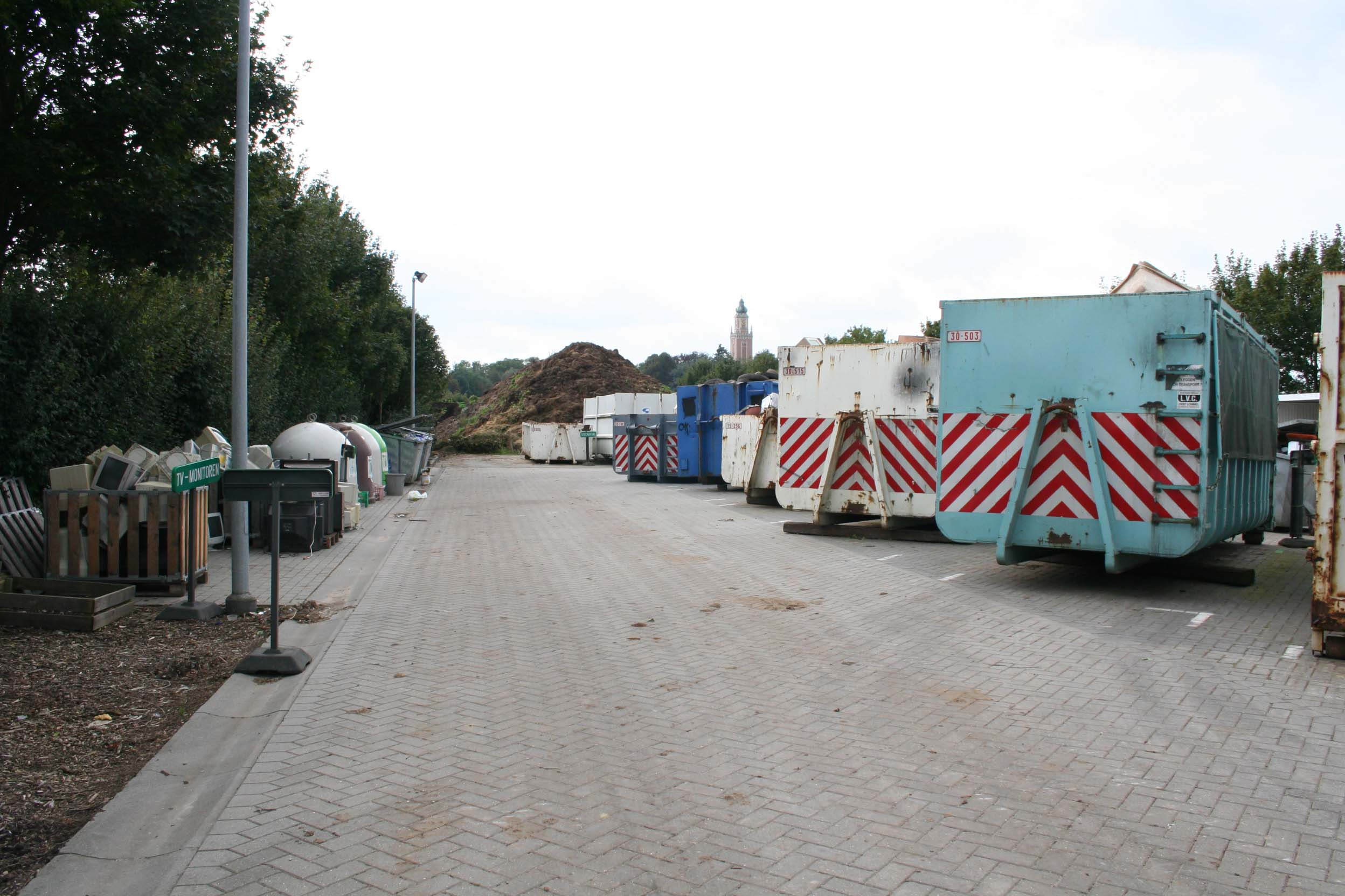 Recyclagepark in Bierbeek